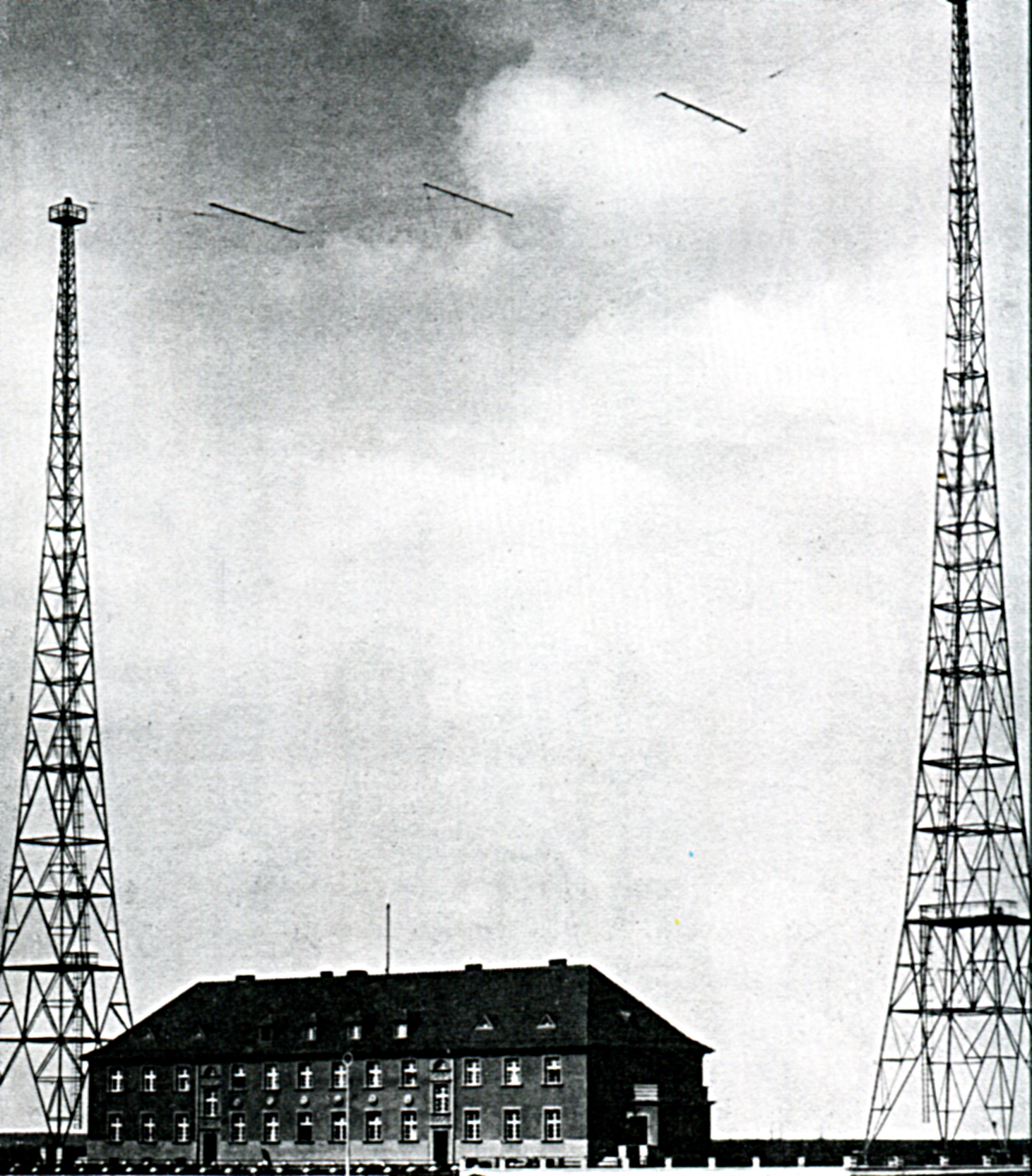 Радиостанция в Гляйвице, события на которой стали началом Второй мировой войны